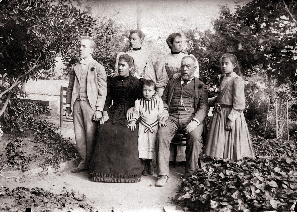 Francesc Brosa i Casanobas, en el jardín de la casa de Tiana, con su mujer Catarina Marroig i Marroig y sus cinco hijos.